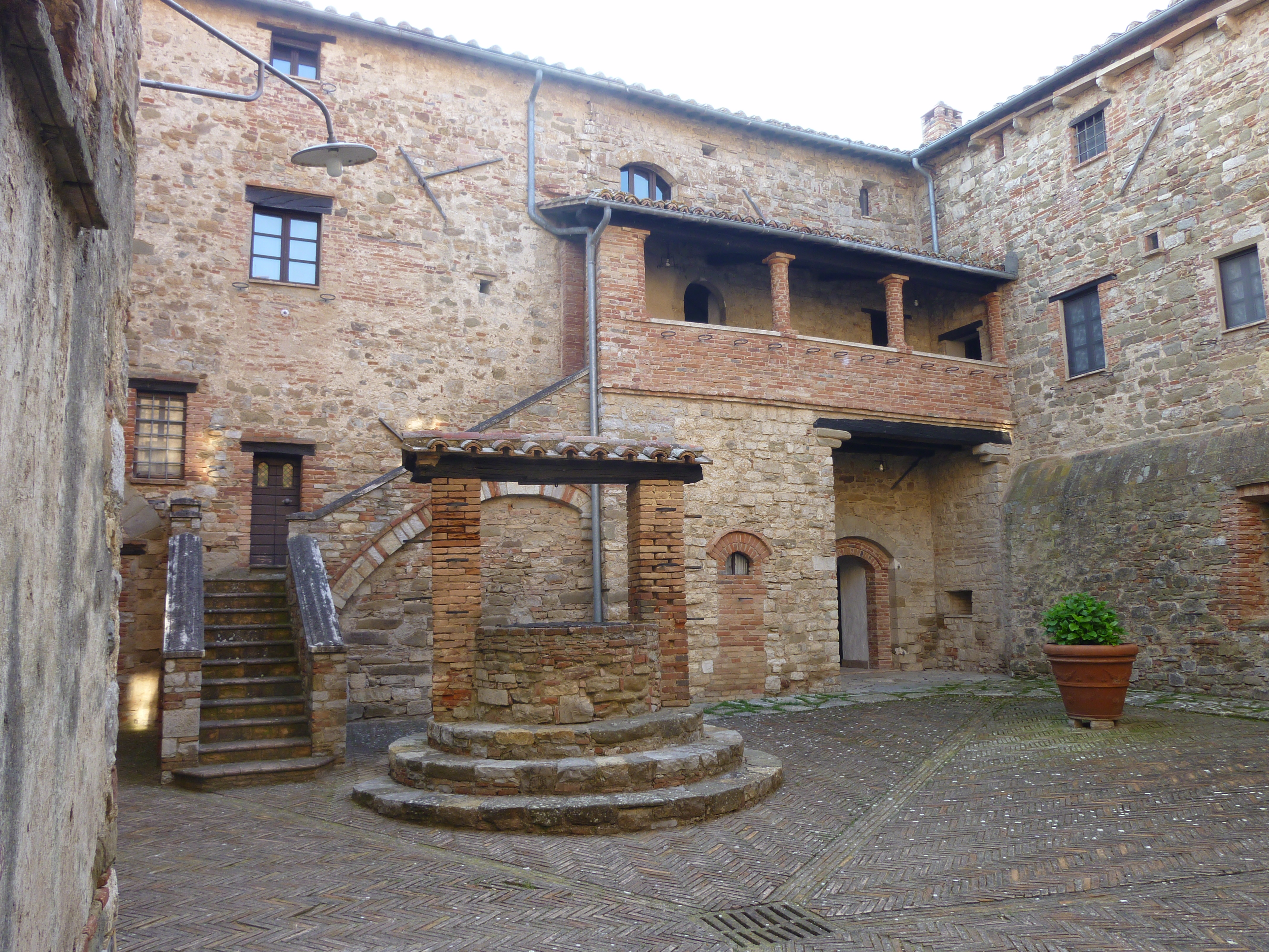 Badia di Sant Arcangelo, Hof